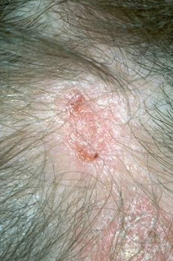 Лупусне промене на поглавини, код Дискоидног еритемског лупуса, 08.новембар 2009.